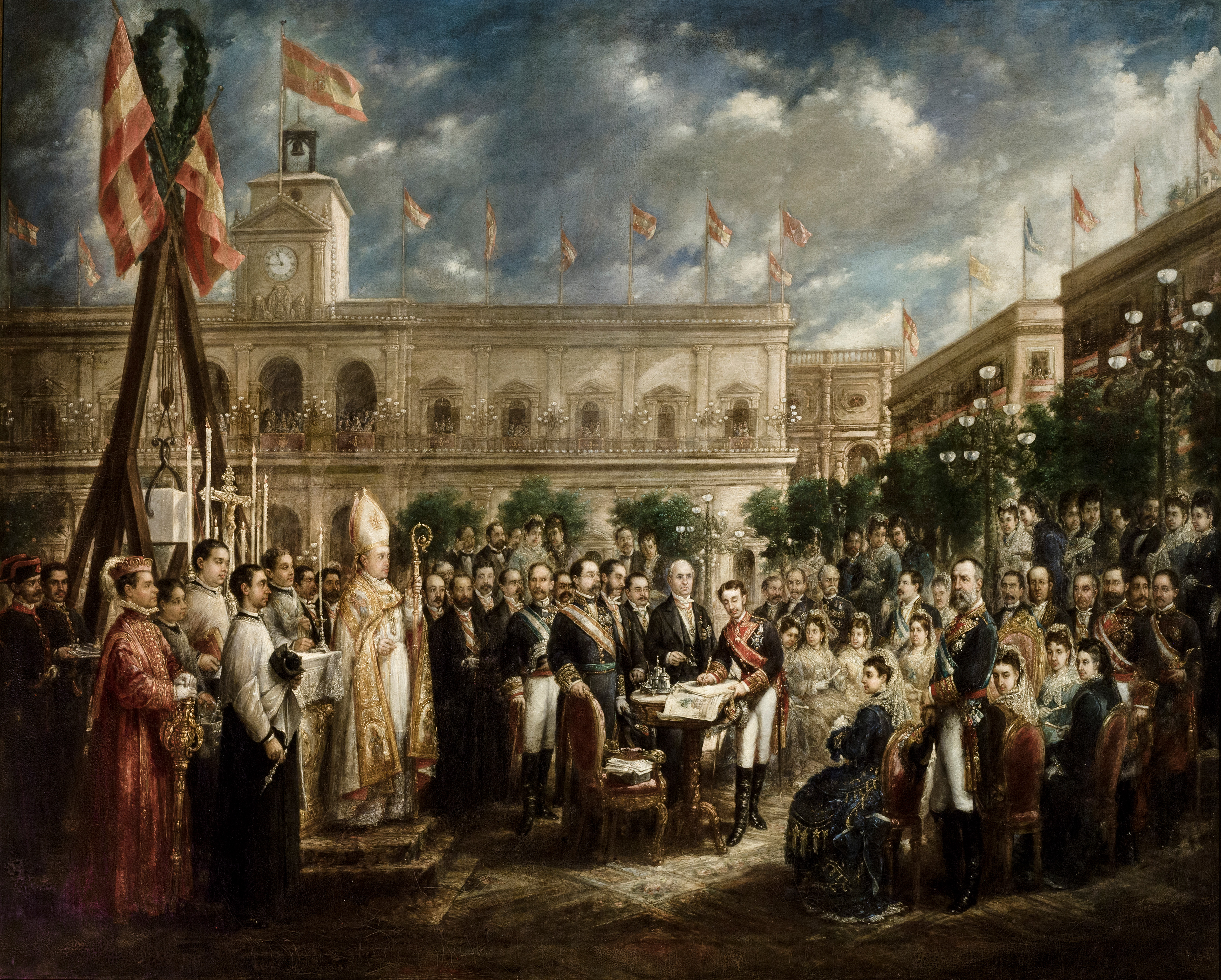 La escena representa la colocación de la primera piedra del monumento a San Fernando en la ciudad de Sevilla, que tuvo lugar en marzo de 1877. En primer plano aparecen, y a la derecha, los duques de Montpensier con sus hijas, y al fondo, la reina Isabel II de España con sus hijas las infantas. Y junto a la mesa en la que el rey Alfonso XII de España firma el documento, aparecen el alcalde José María Ybarra Gutiérrez de Caviedes, conde de Ybarra, Francisco de Borja Queipo de Llano, conde de Toreno, el presidente del Gobierno, Antonio Cánovas del Castillo, el capitán general Fernando Primo de Rivera, Manuel Silvela, el jefe de la oposición y un prelado.